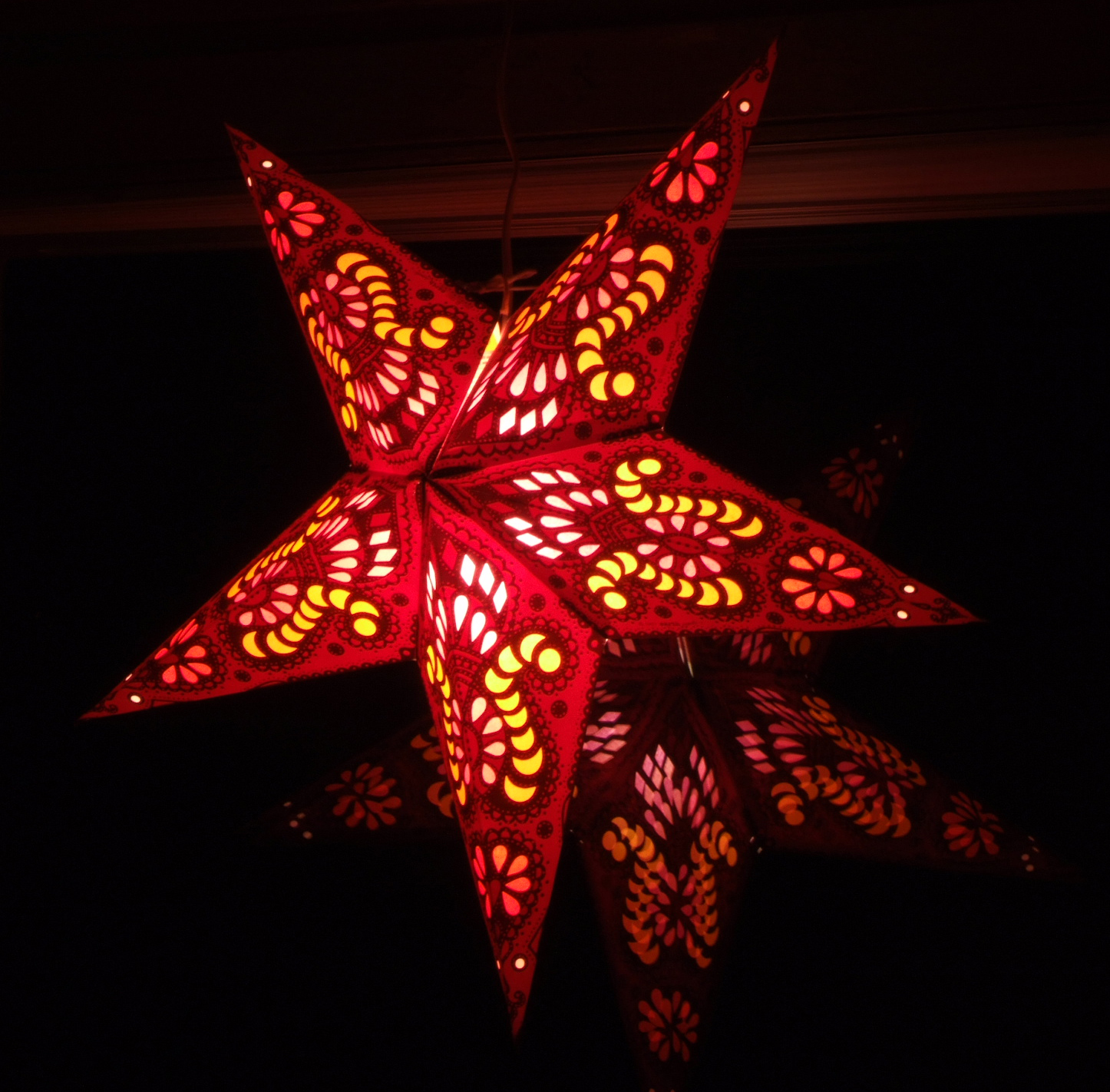 Ein roter Stern als weihnachtliche Dekoration